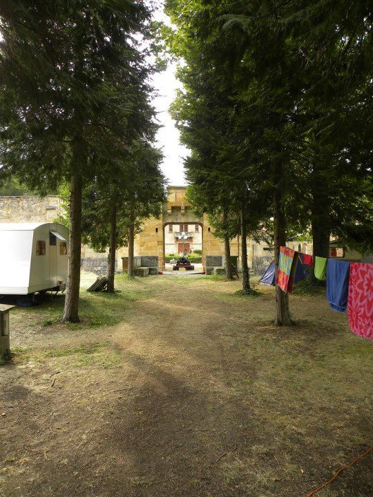 ancienne entrée du château aujourd'hui condamnée par un canon